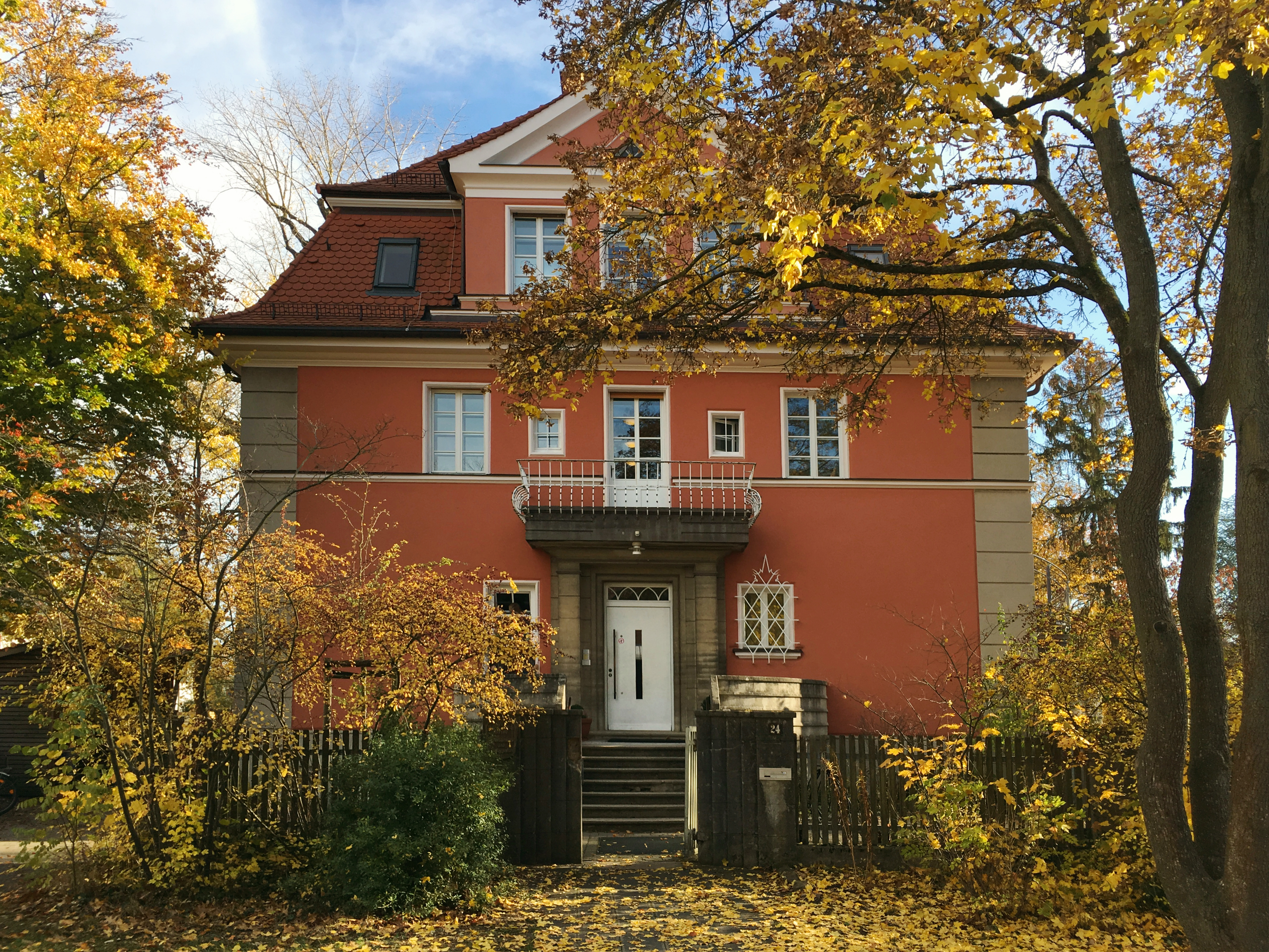 Rudolf Steiner Schule in Nürnberg 2018